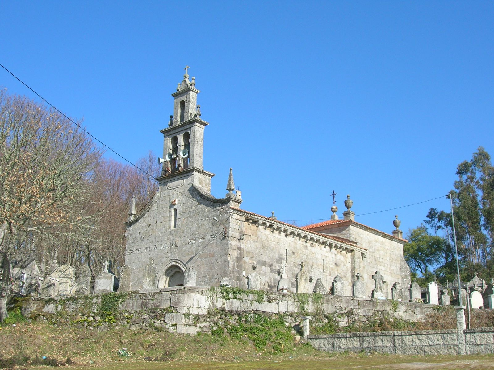 Igrexa de Santa María de Xuvencos, Boborás